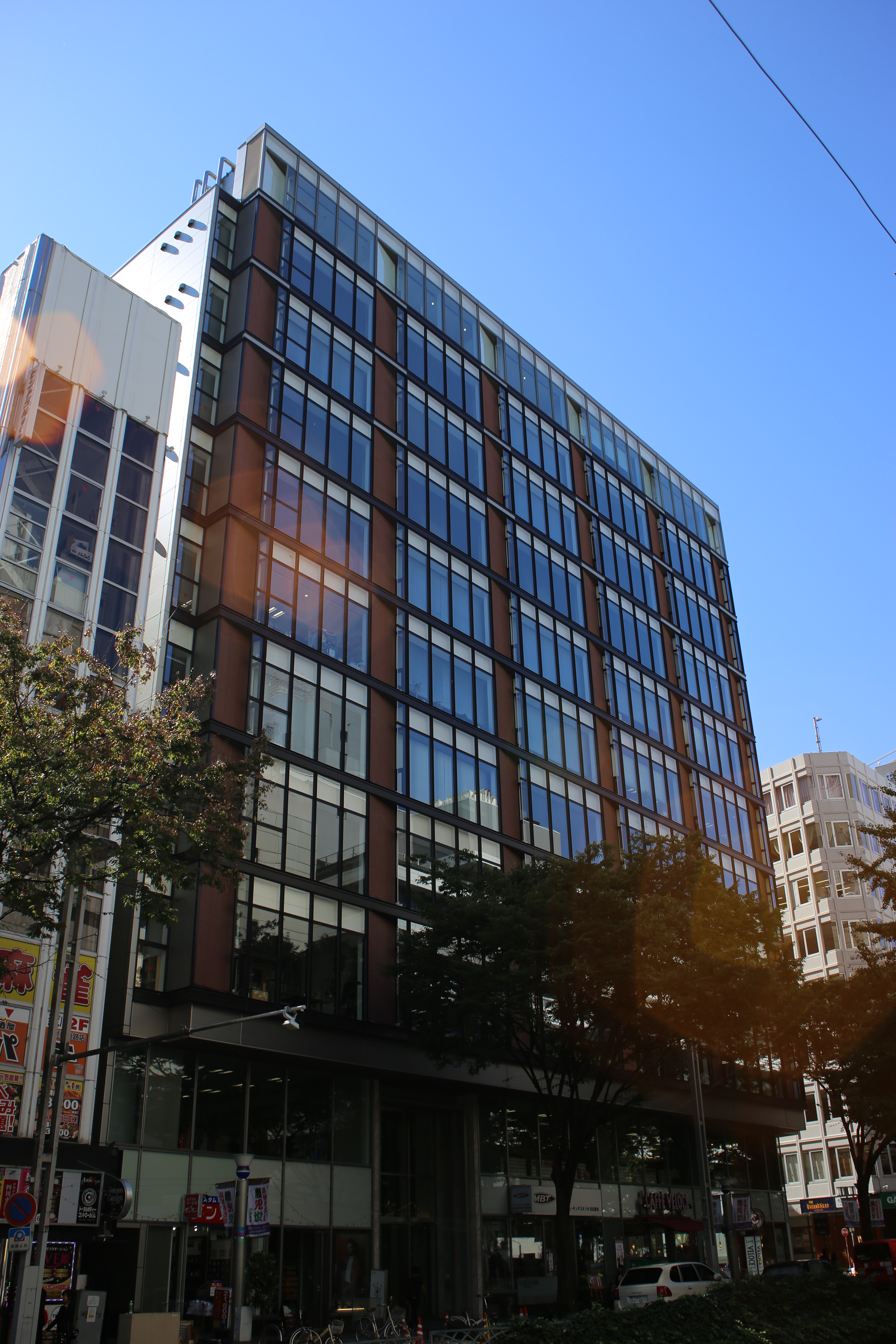 名古屋市中区栄四丁目のKDX名古屋栄ビルを北側公道東側より撮影